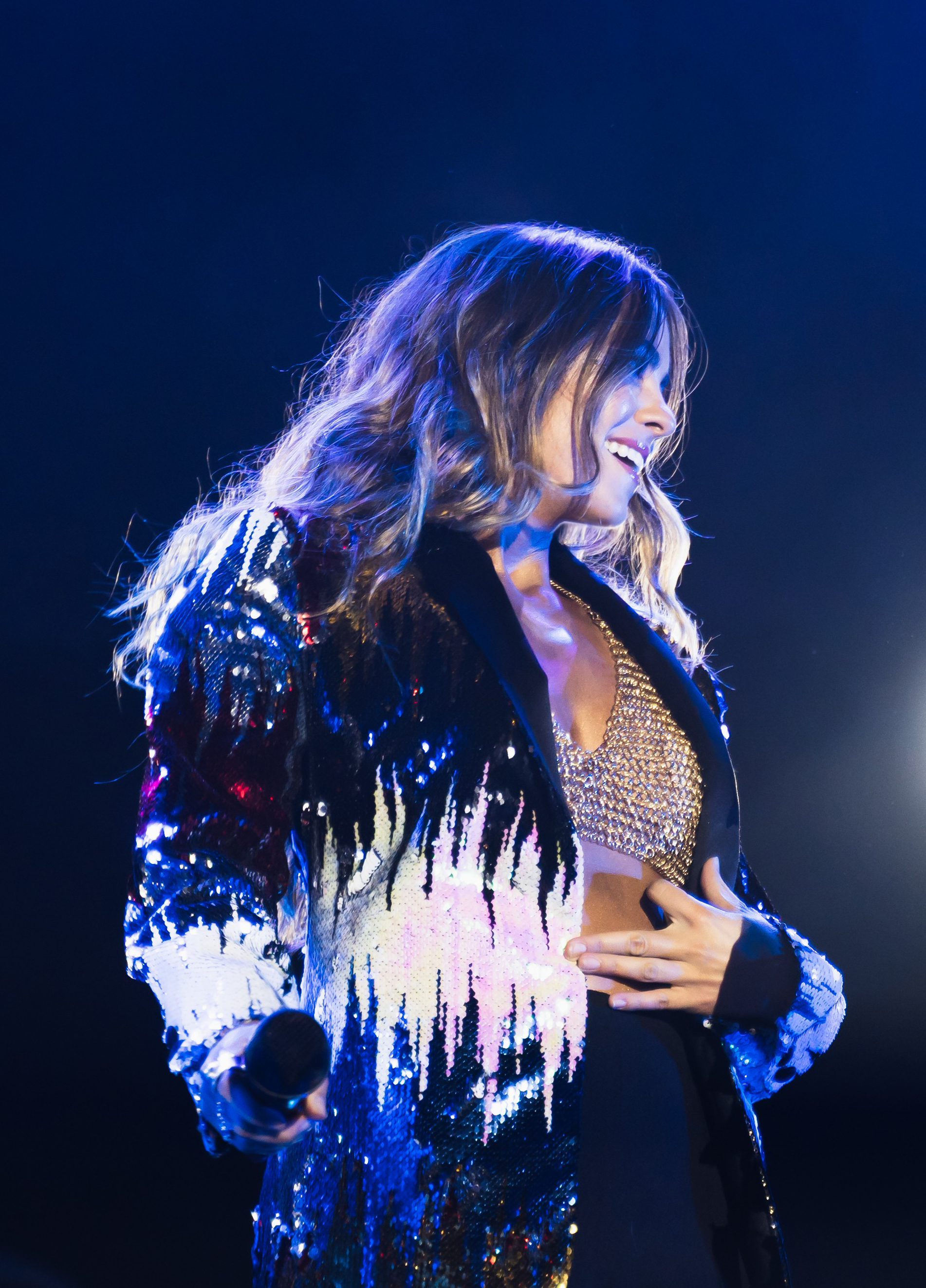 Sofía Ellar en el tour "Bañarnos en Vaqueros", Wizink Center, Madrid, 17 octubre 2019.